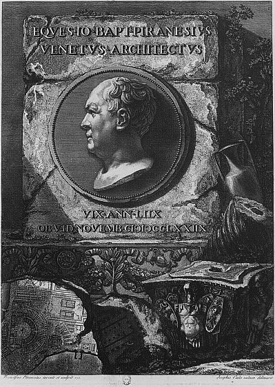 Portrait of Giovanni Battista Piranesi